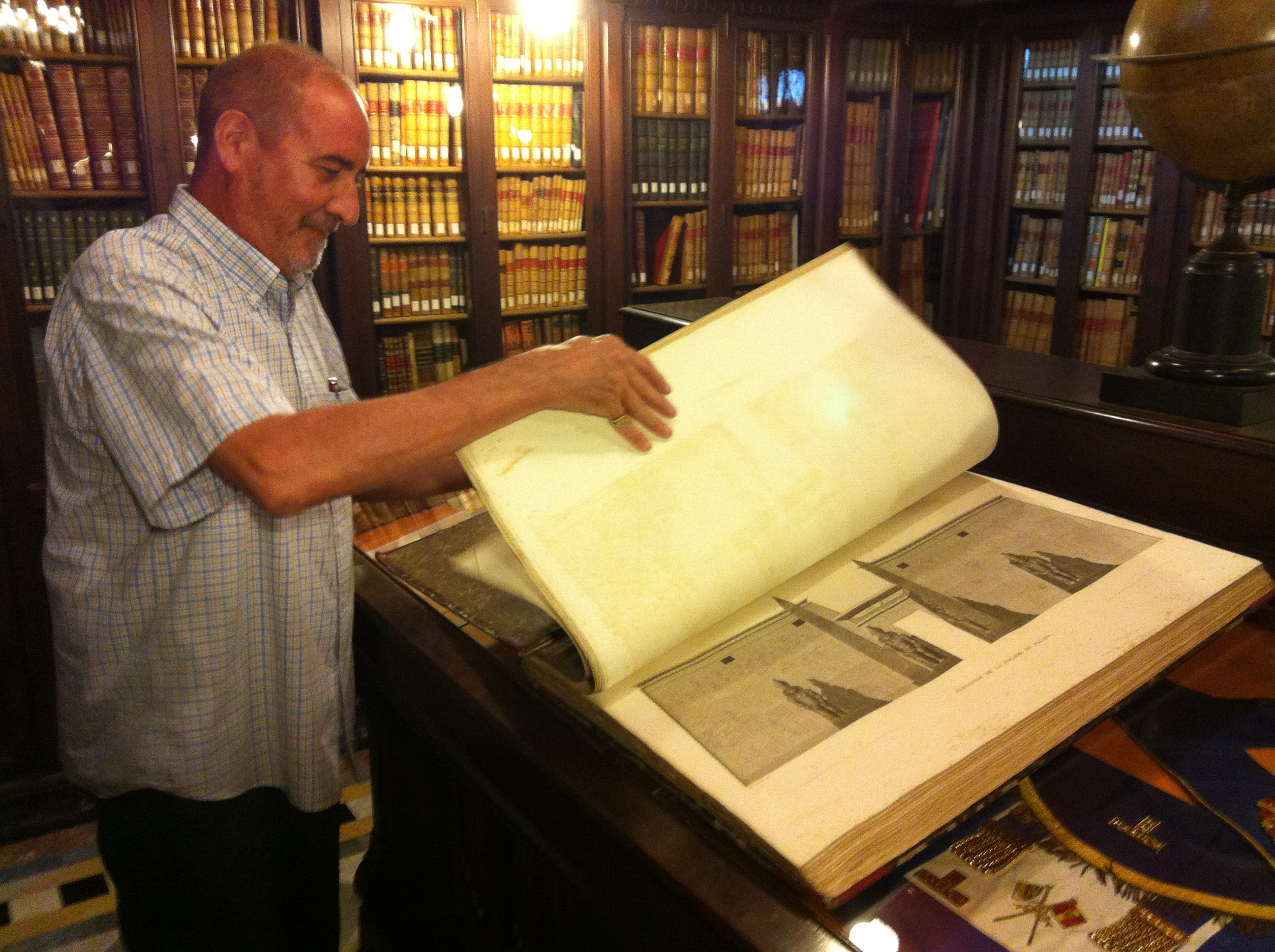 Biblioteca Pública Arús, situada al Passeig Sant Joan de Barcelona